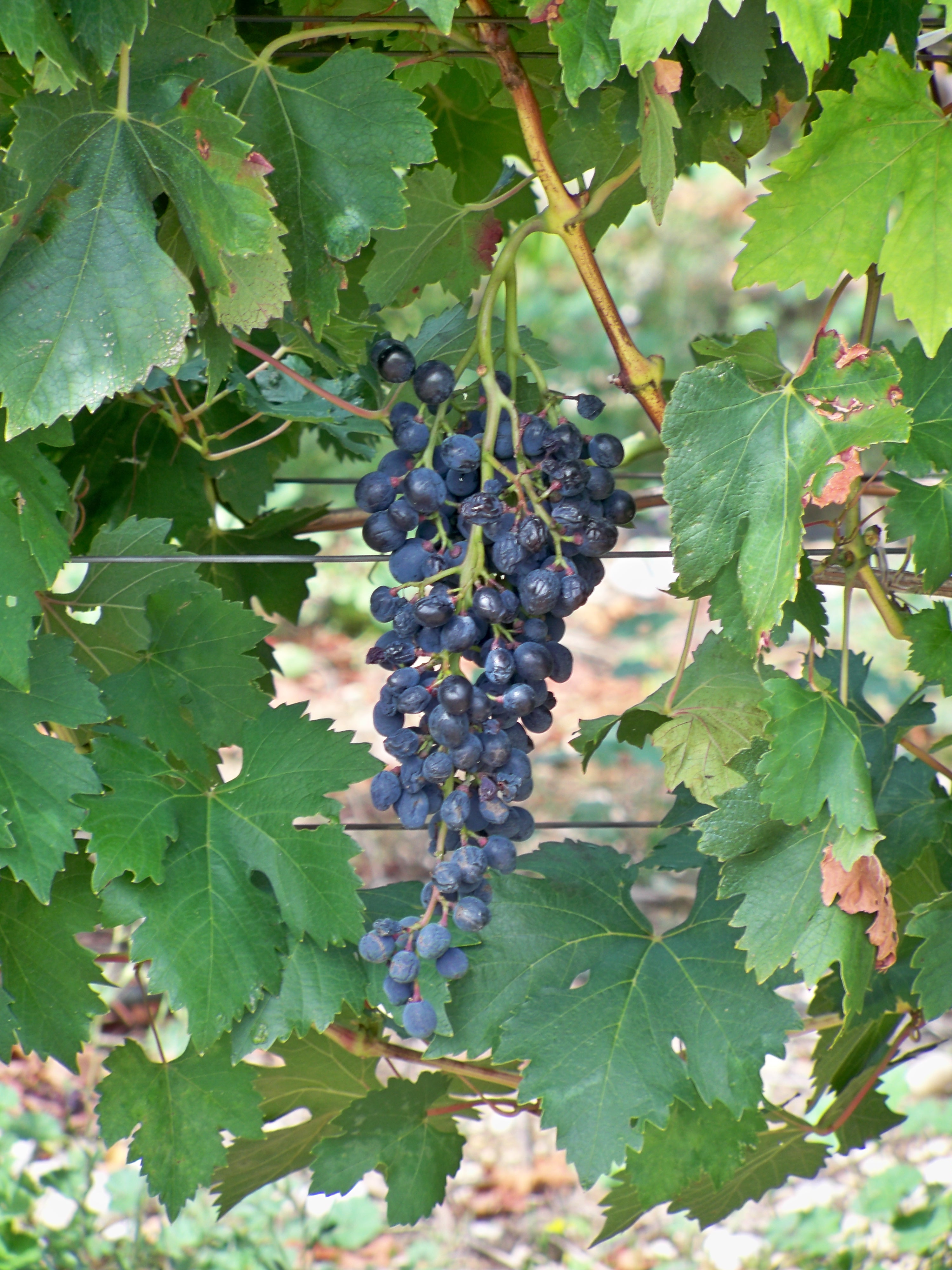 Raisin de Vignoble AOC Ventoux